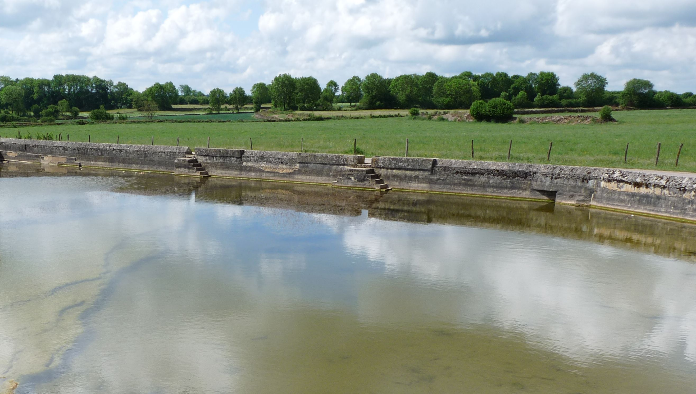 Alimentée par le trop-plein de la fontaine voisine, on y puisait l'eau pour remplir les abreuvoirs.